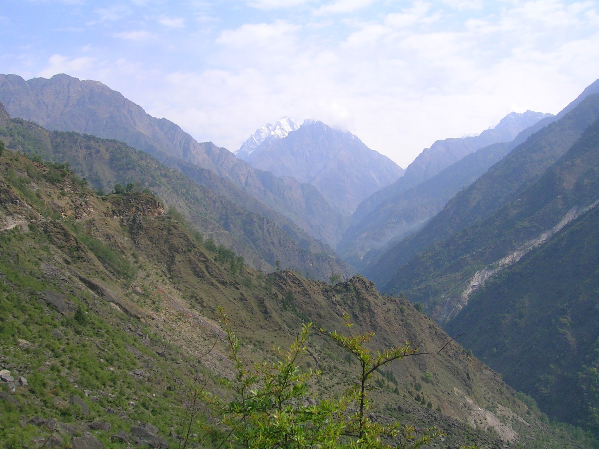 Gori river valley, Uttarakhand